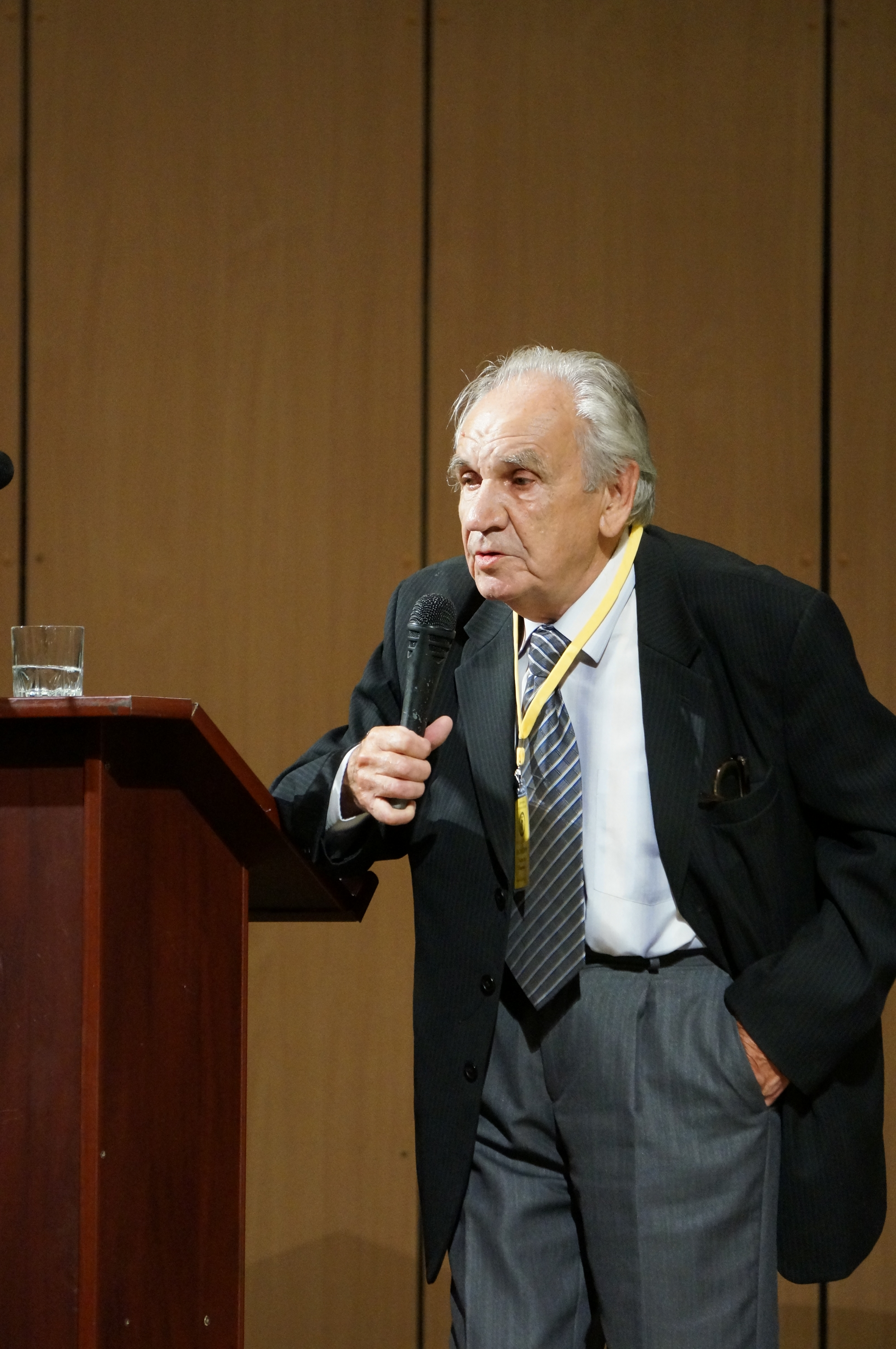 Василевич Владислав Иванович. XIII съезд Русского ботанического общества. Тольятти, 2013 год.